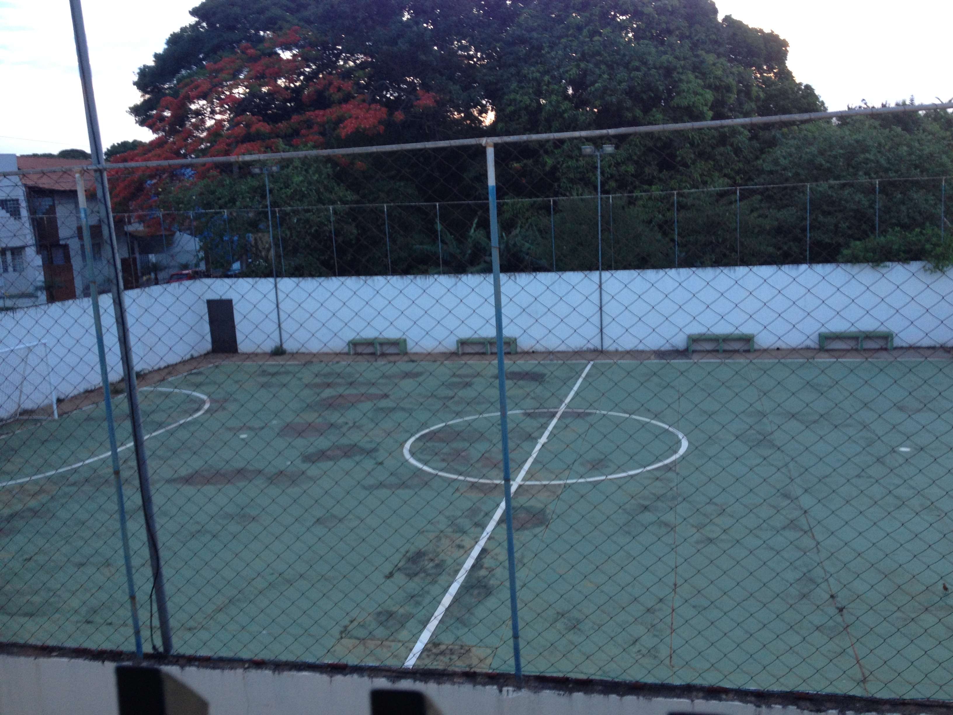 مخصص لابناء الجالية المسلمة